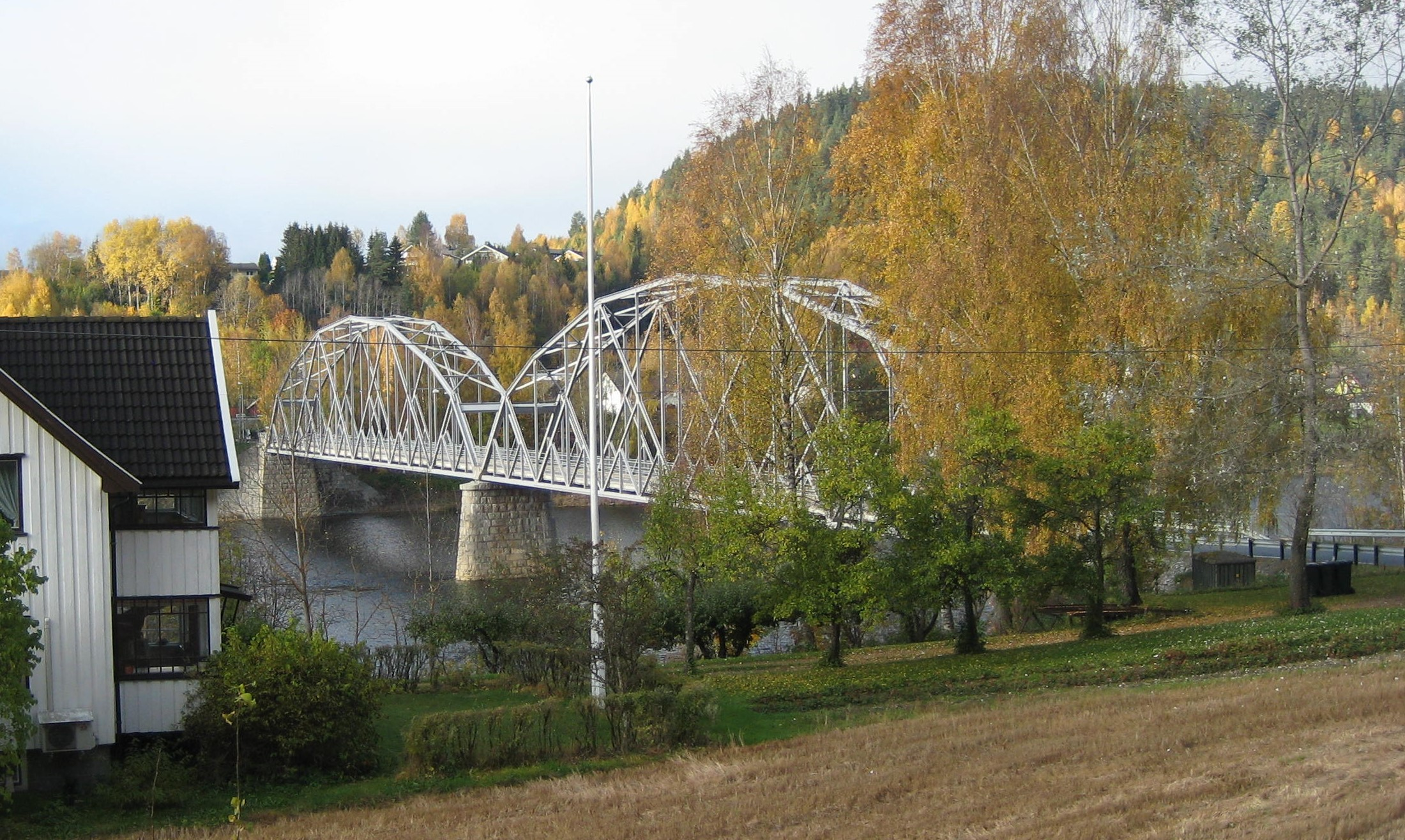 Skotselv Bro, Buskerud